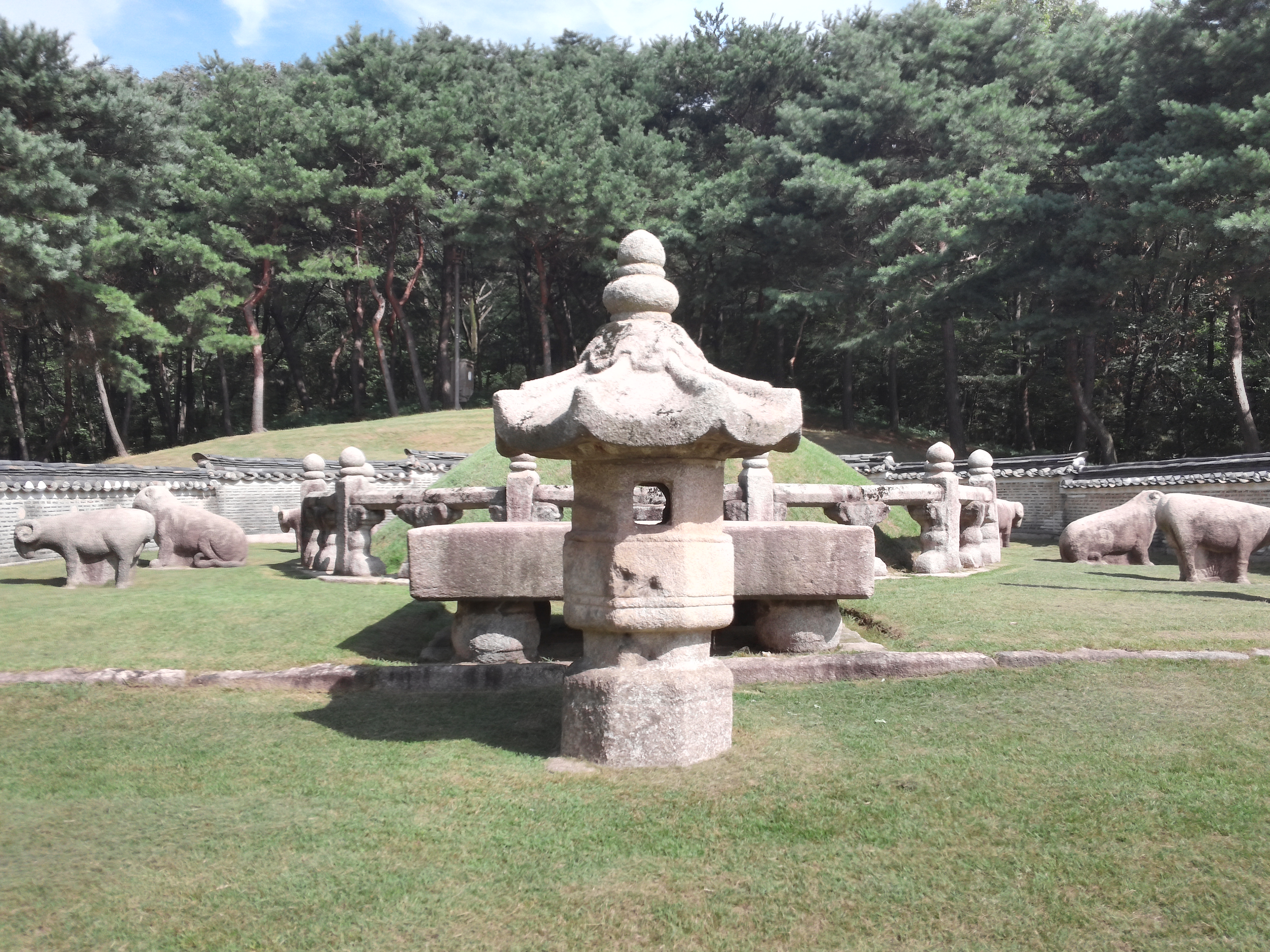 경릉(敬陵) 소혜왕후(인수대비) 봉분 앞 석물들.